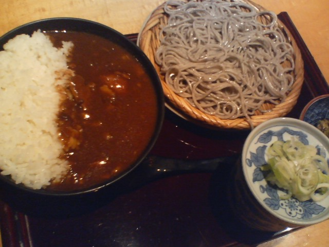 カレー丼とおそばのセット。 高田屋。巣鴨に来たよ。